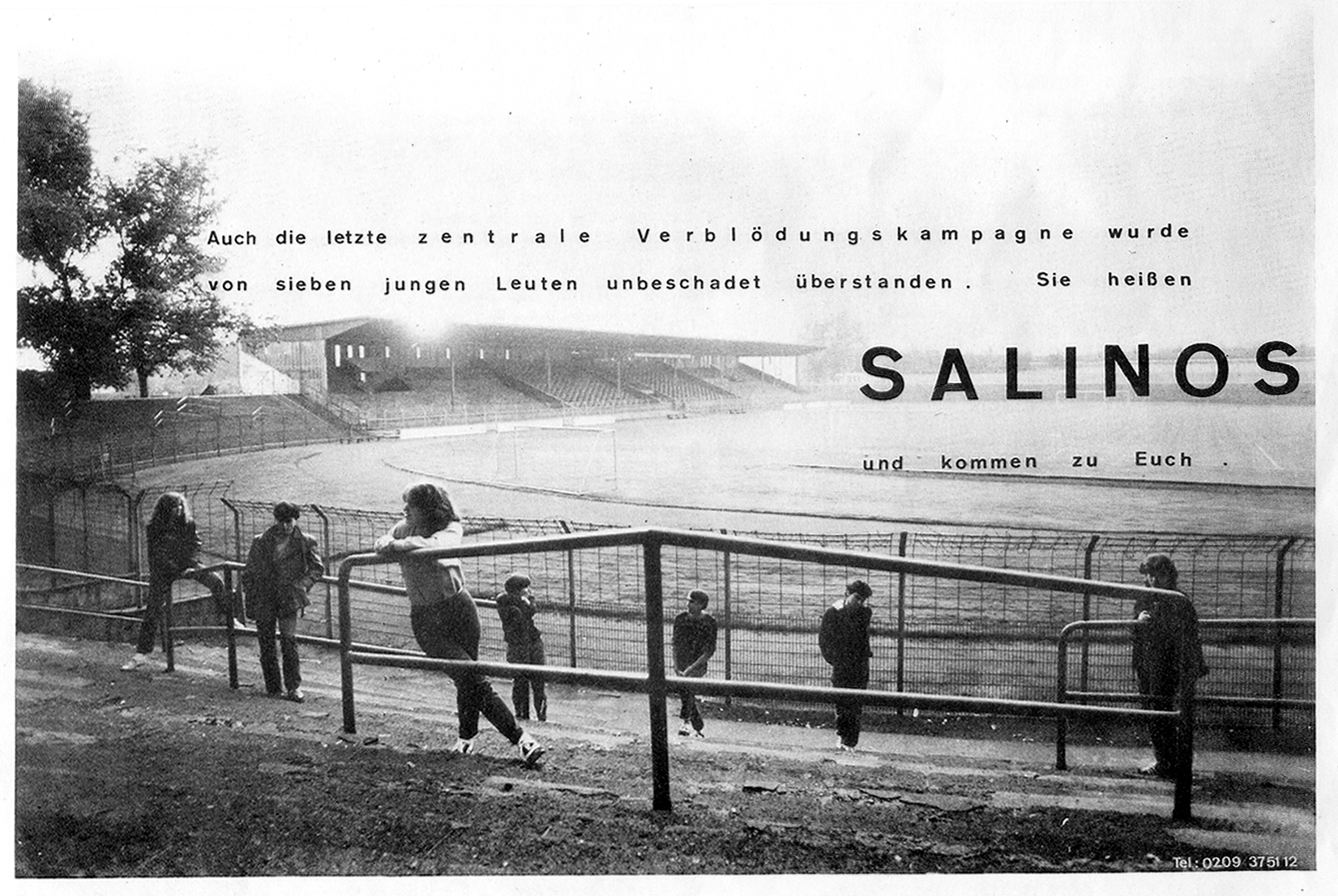 Dieses Plakat wird auch auf dem Innersleeve der LP "Du siehst nicht aus wie ich aussehe" verwendet.